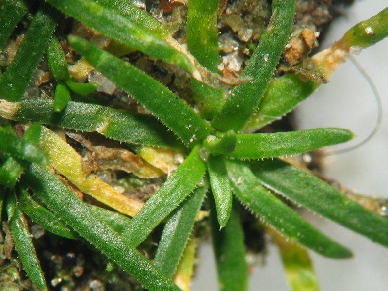 Niederliegendes Mastkraut Sagina procumbens, Rostock